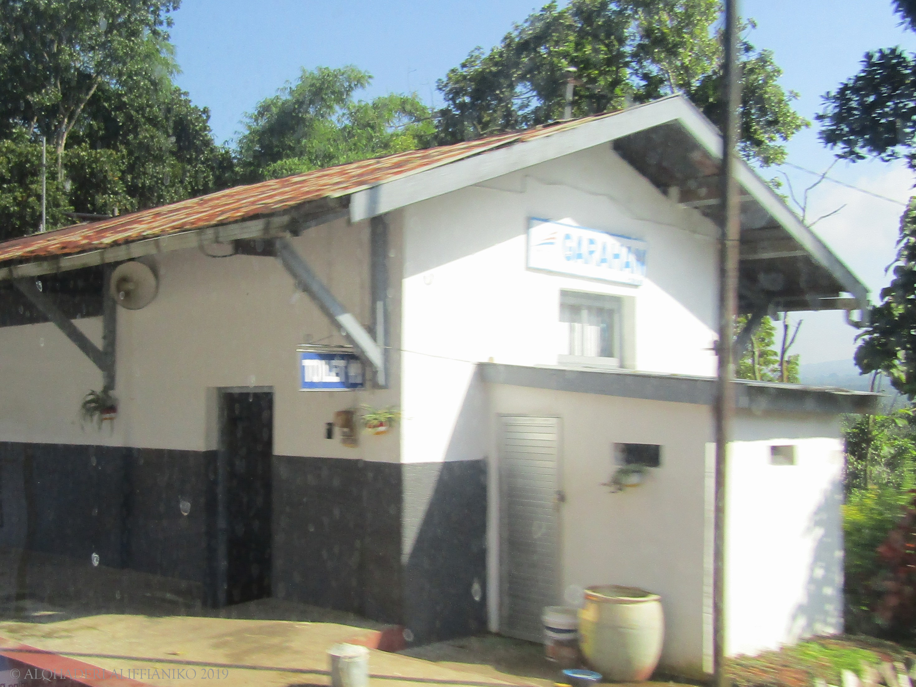 Stasiun Garahan, dilihat dari peron